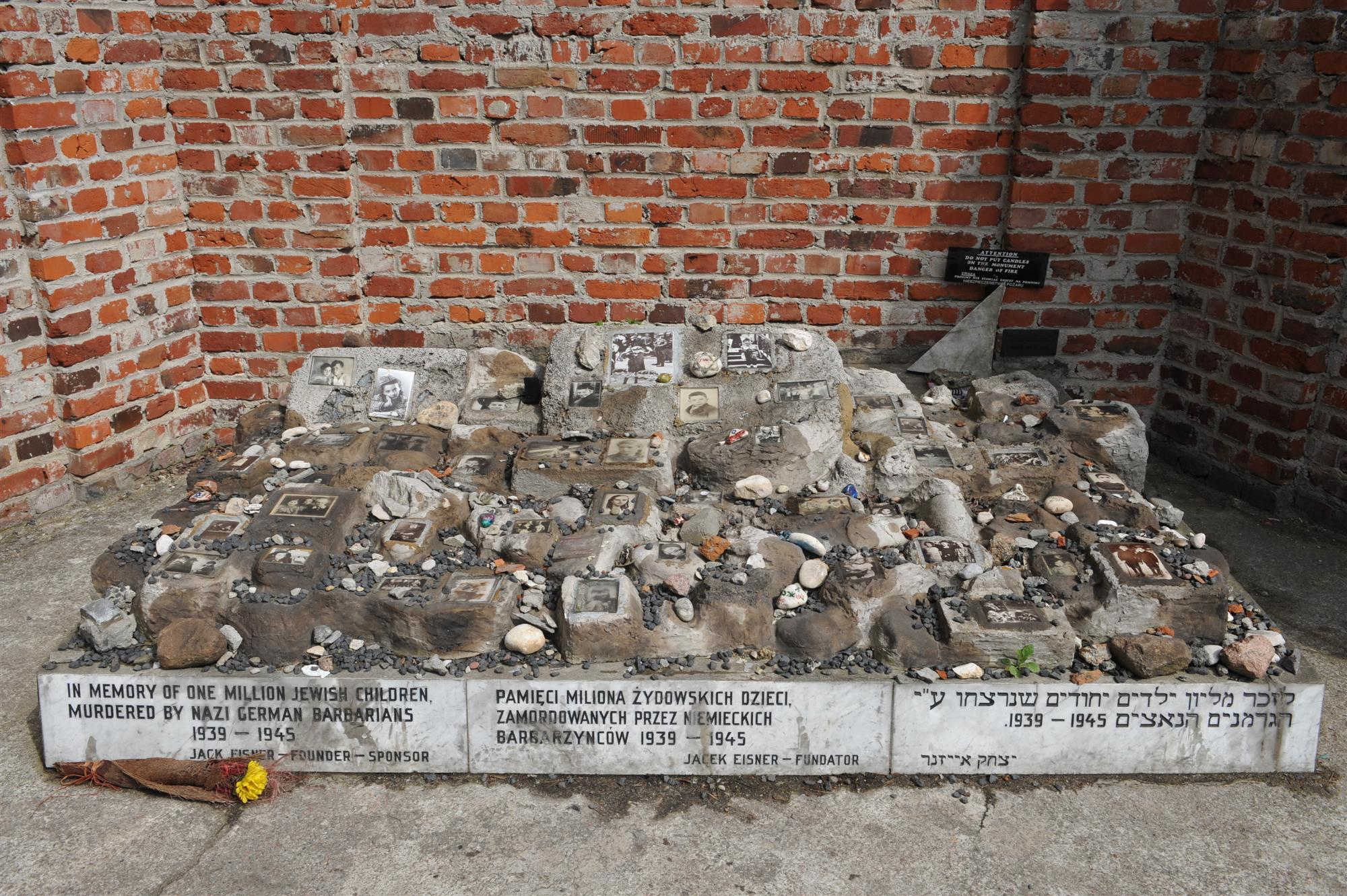 Fragment Pomnika Pamięci Dzieci – Ofiar Holokaustu